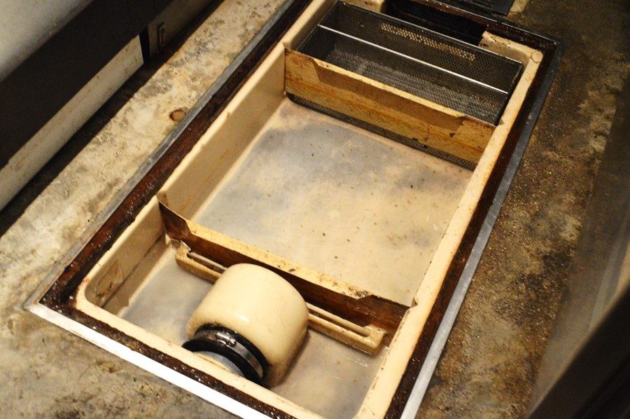 グリストラップの状況